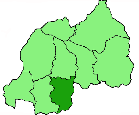 Mappa della diocesi cattolica di Butare, in Ruanda. Anno 2009.